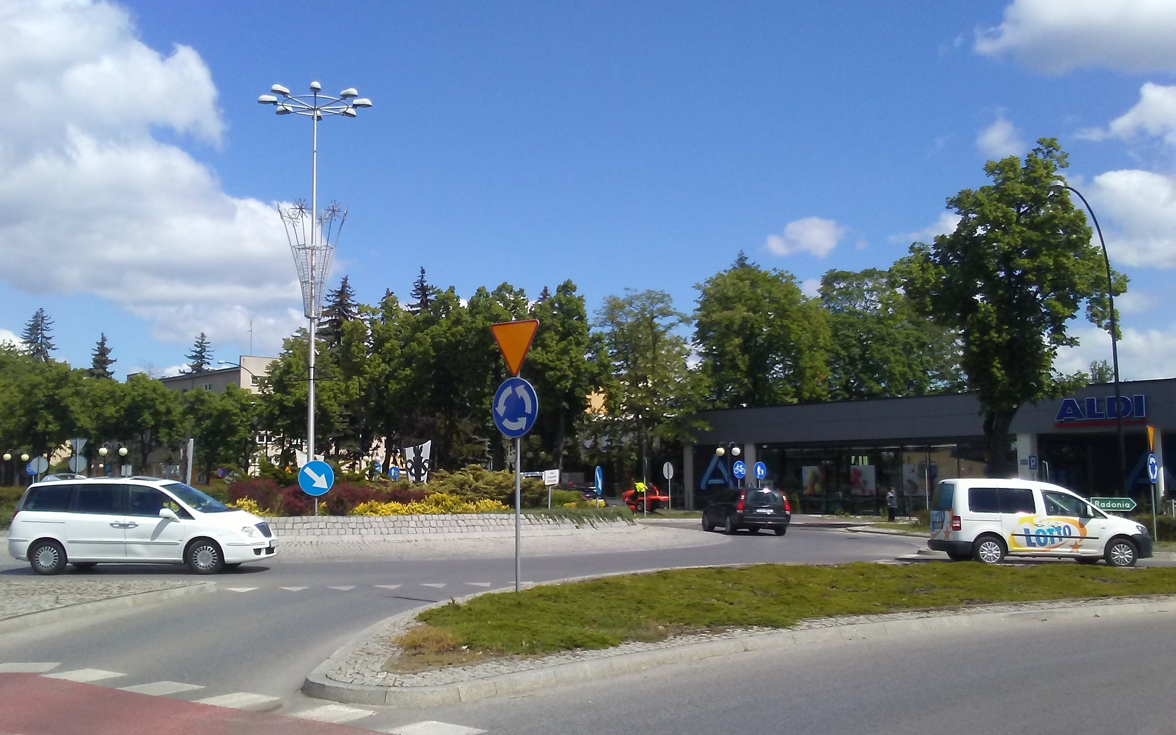 „Participants of the Olympics from Tomaszów” roundabout, Tomaszów Mazowiecki, Poland